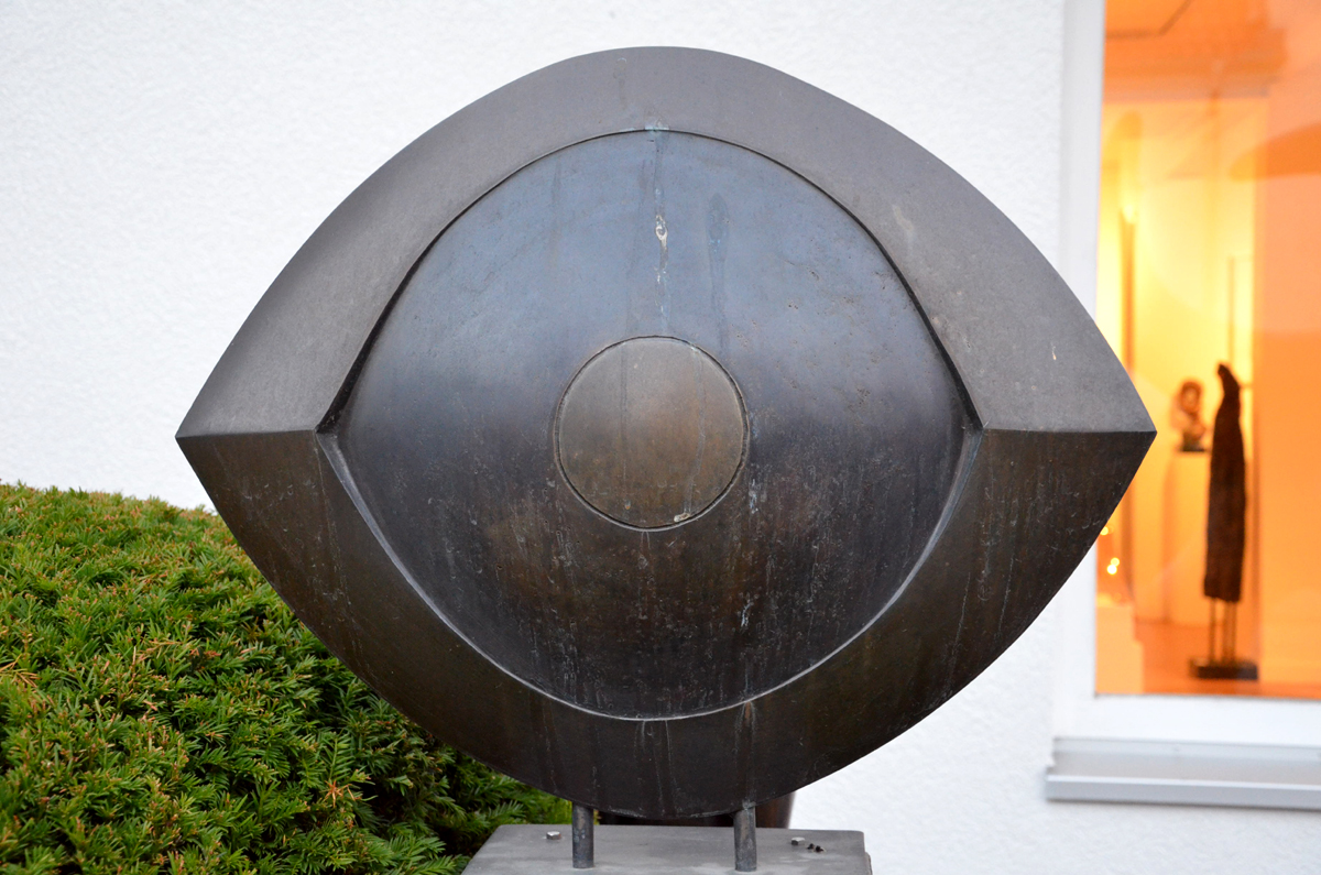 Einen 2006 vom Kunstkreis Laatzen ausgelobten Wettbewerb gewann das Modell Auge des Bildhauers Wolfgang Mehl, hier mit Patina als eines von bisher 12 großformatigen Skulpturen vor dem Atelier in der Namedorfstraße 12 in Hannover-Bemerode zu sehen. Die Skulptur in einer verkleinerten Version wird seitdem jährlich von der Stadt Laatzen beim Neujahrsempfang vergeben als Preis für Zivilcourage ...